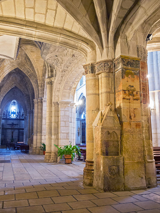 Iglesia catedralicia de Santa María Magdalena. Torrelaguna. Madrid.